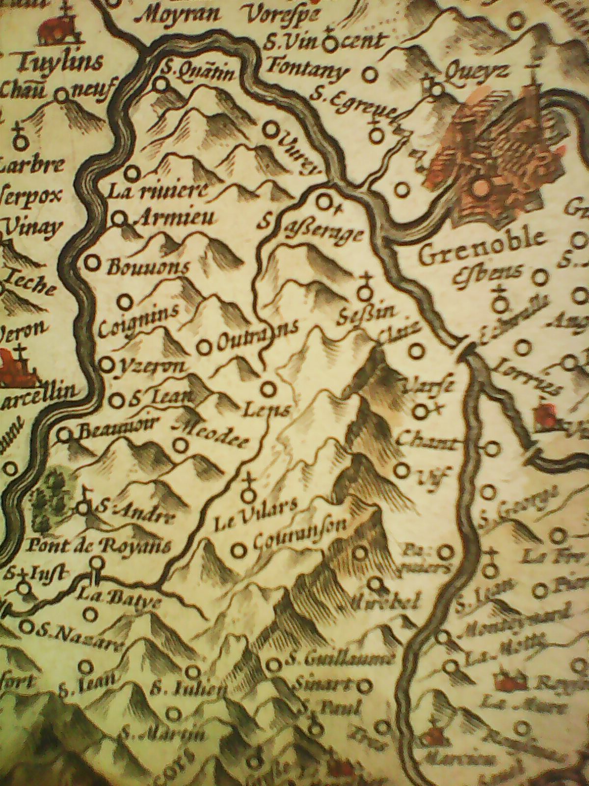 Carte Jean de Beins (1631)